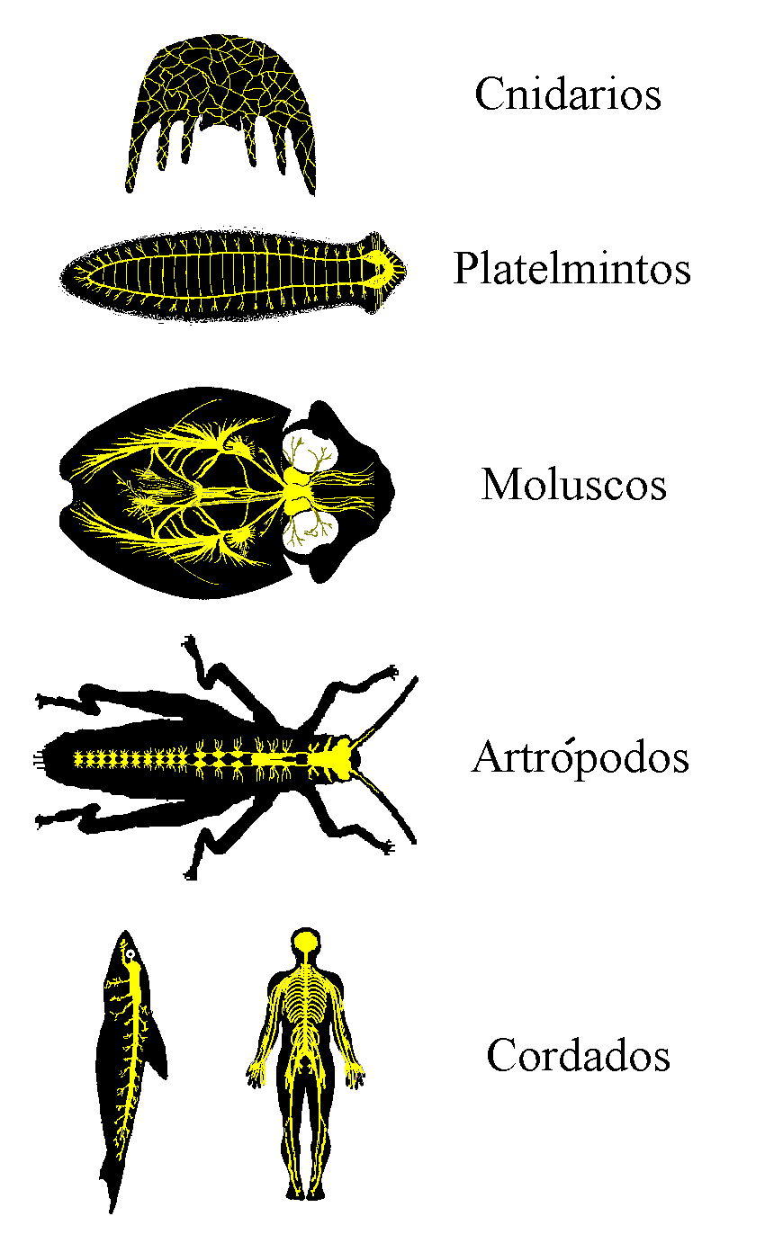 Sistema nervioso de distintos animales